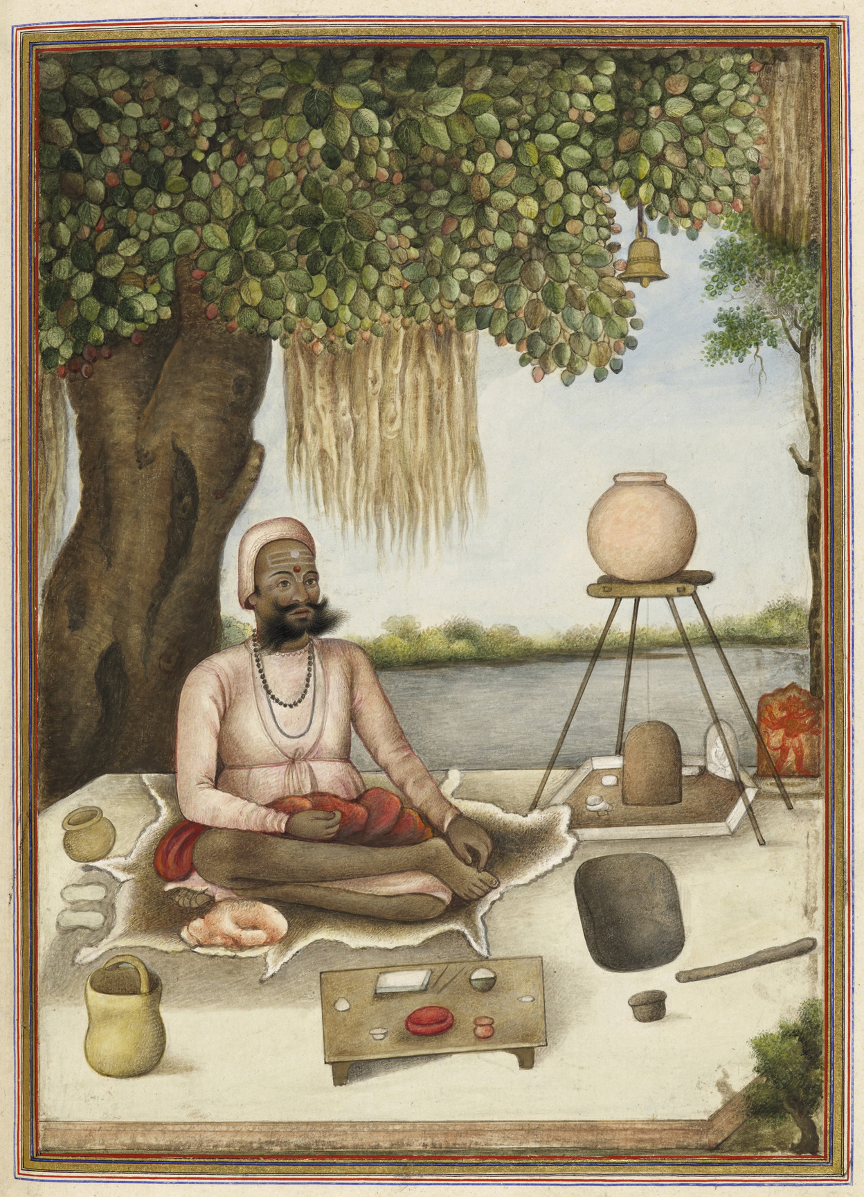 Sannyasi’ a Saiva mendicant.